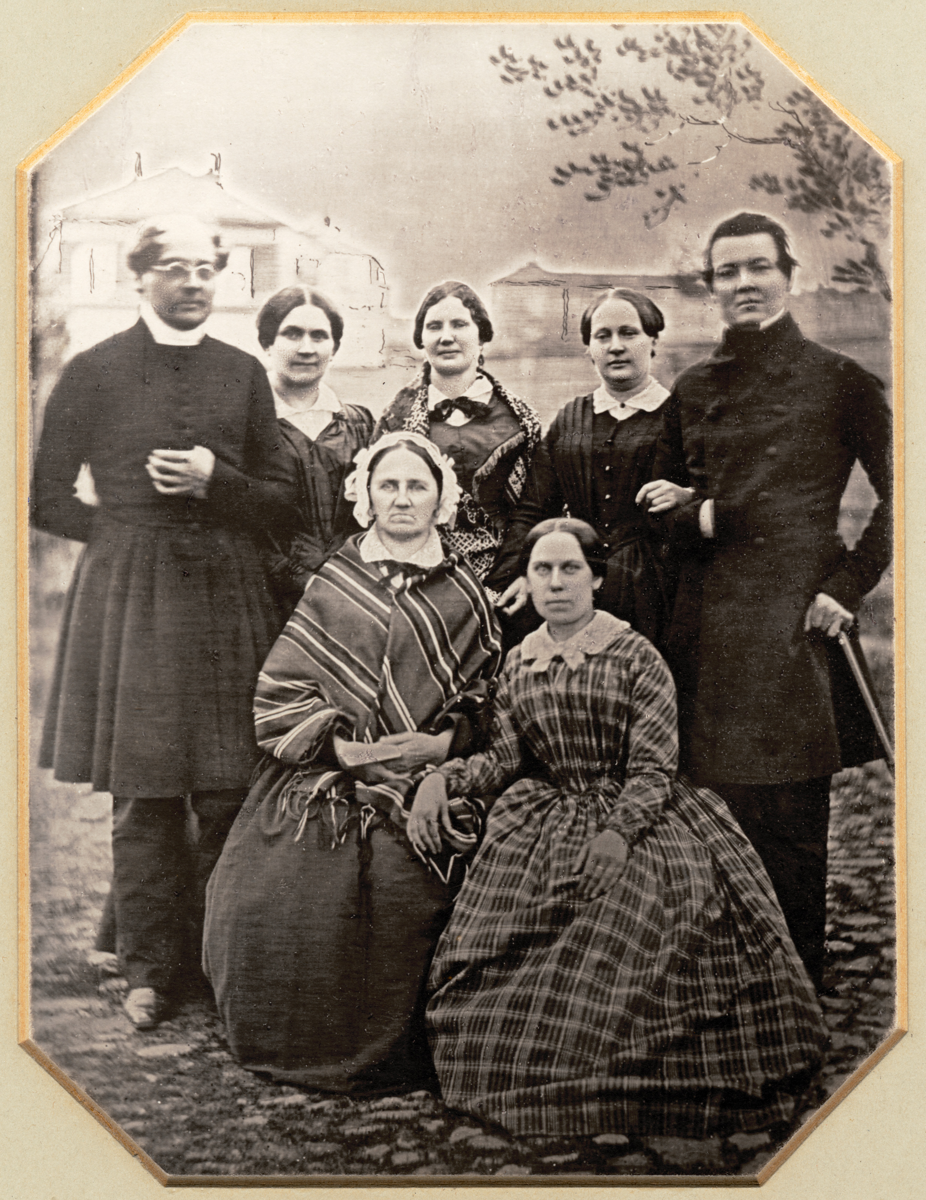 J.L. Runeberg, Fredrika Runeberg, Annette Reuterskjöld, Tilda och Adolf Sirén samt sittande Emma Borgström och hennes dotter Fiken. Kopia av dagerrotypin 1846 av Joseph Desarnod. Originalet tillhörde 1953 Anna Kivenoja i Helsingfors. Signum: slsa1160_364 Runebergbibliotekets bildsamling Svenska litteratursällskapet i Finland